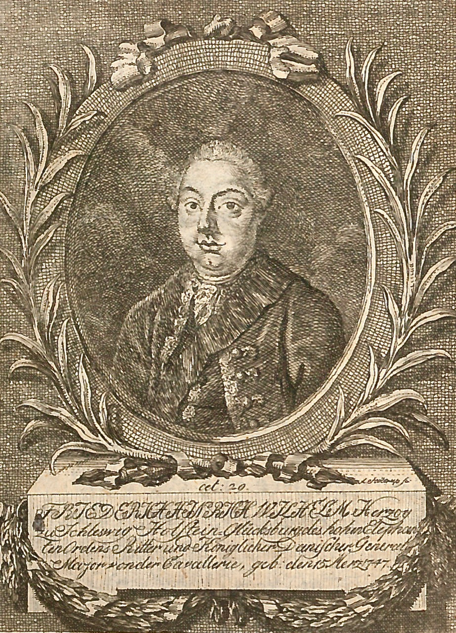 Hertug Frederik Henrik Vilhelm af Slesvig-Holsten-Sønderborg-Glücksborg, fra Bericht von der Halbinsel Sundewitt, Johann Christian Gude, 1778